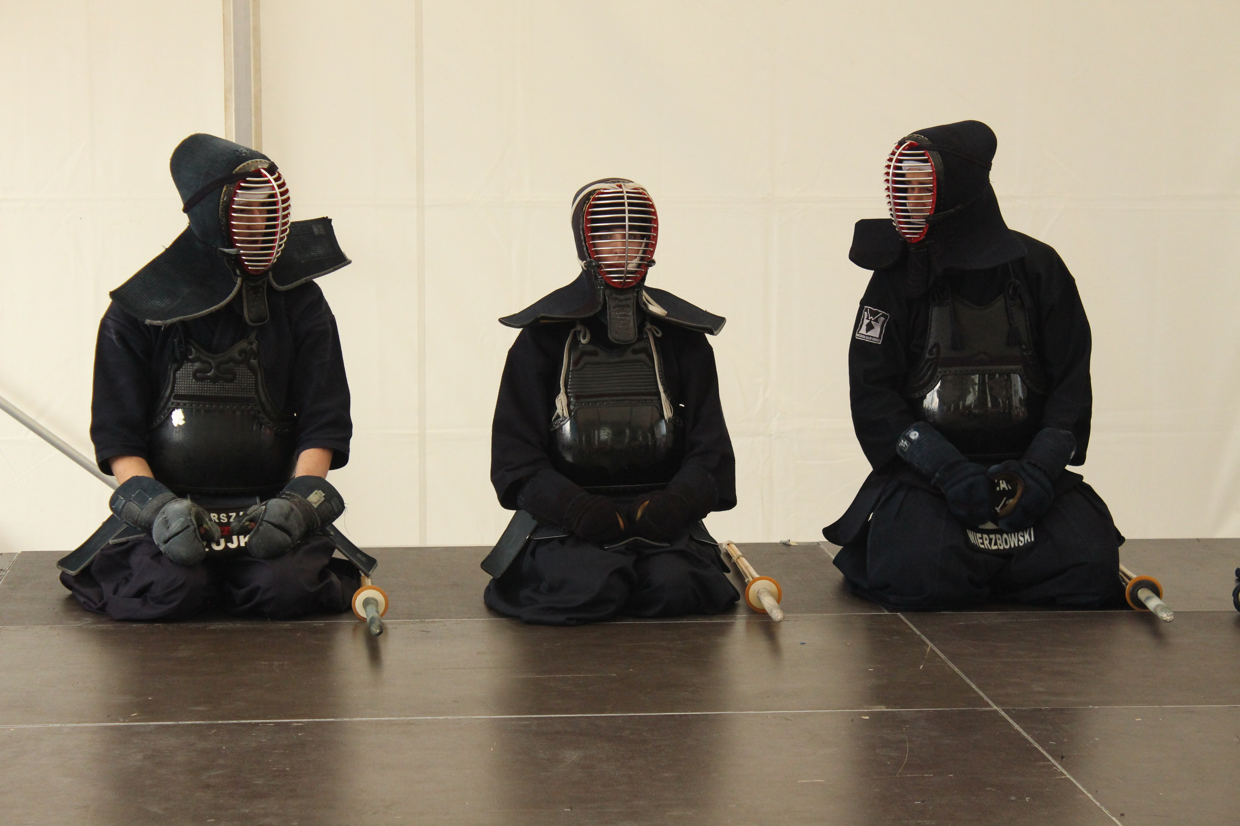 kendo. This image has been originally created as the illustration for Fakten über Kampfsportarten at . It has been released under CC-BY-3.0 license.